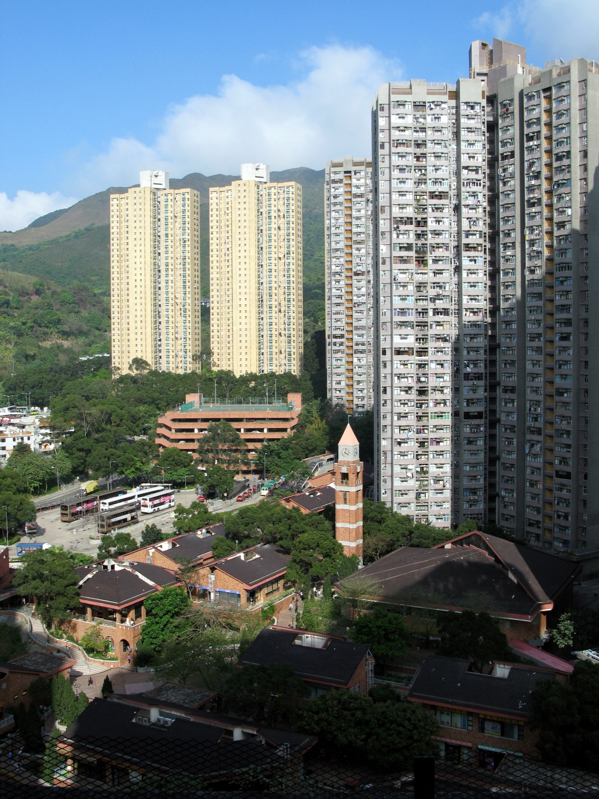 香港廣源邨 HK Kwong Yuen Estate